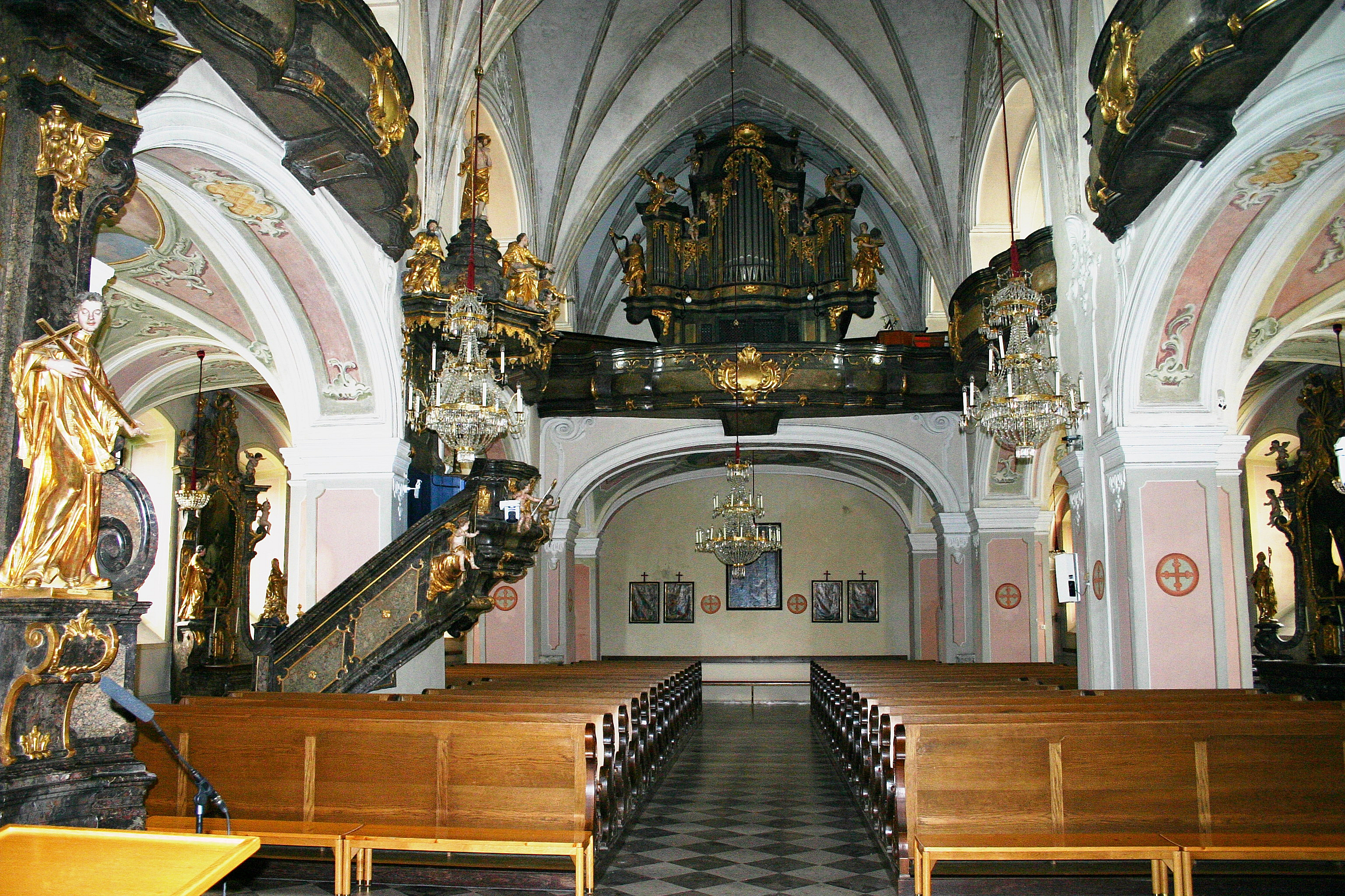 Hartberg Innenraum der Pfarrkirche mit Pfeifenorgel